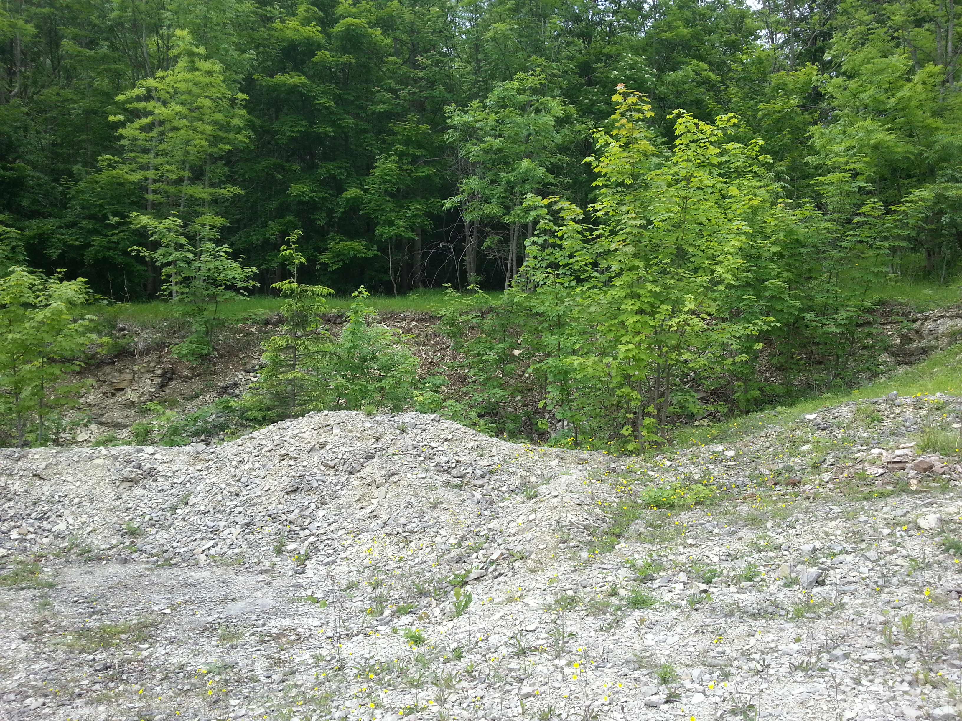 Im Wald bei Haynrode